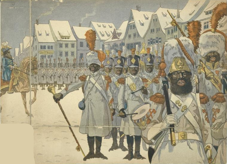 Quinto Cenni, 7° reggimento fanteria di linea Real Africano